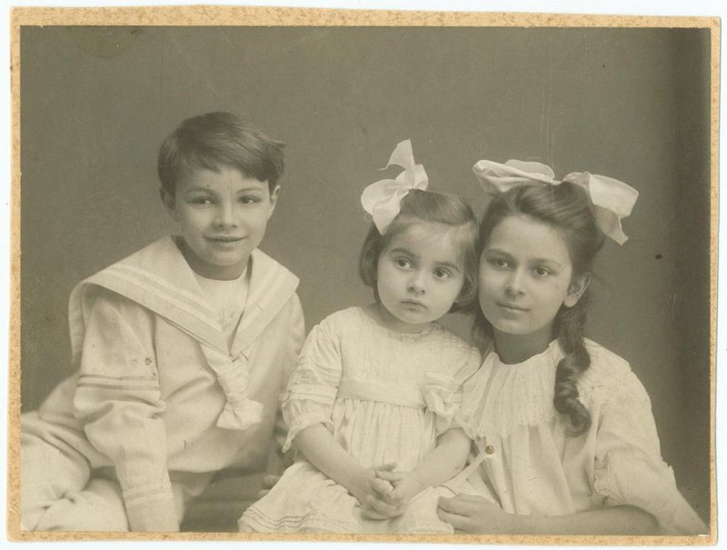 Scriabin's children: Ariadna,_Marina,_Yulian